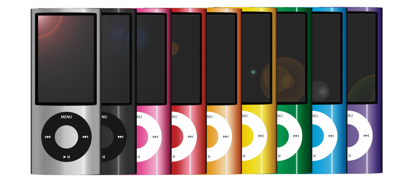 iPod nano 5G